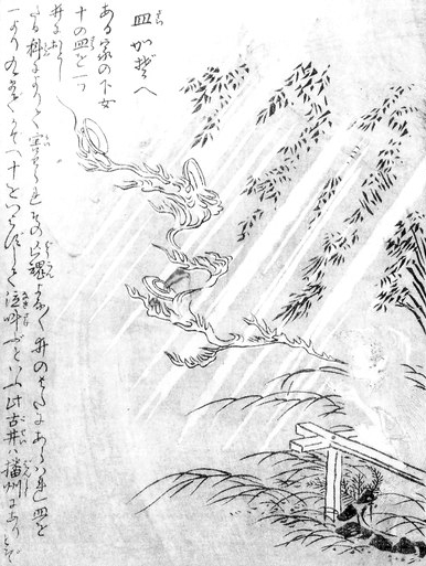 Sarakazoe (皿数え, Banchō Sarayashiki) from the Konjaku Gazu Zoku Hyakki (今昔画図続百鬼)